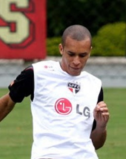 Jogador Miranda, treinamento do São Paulo Futebol Clube em 2009.